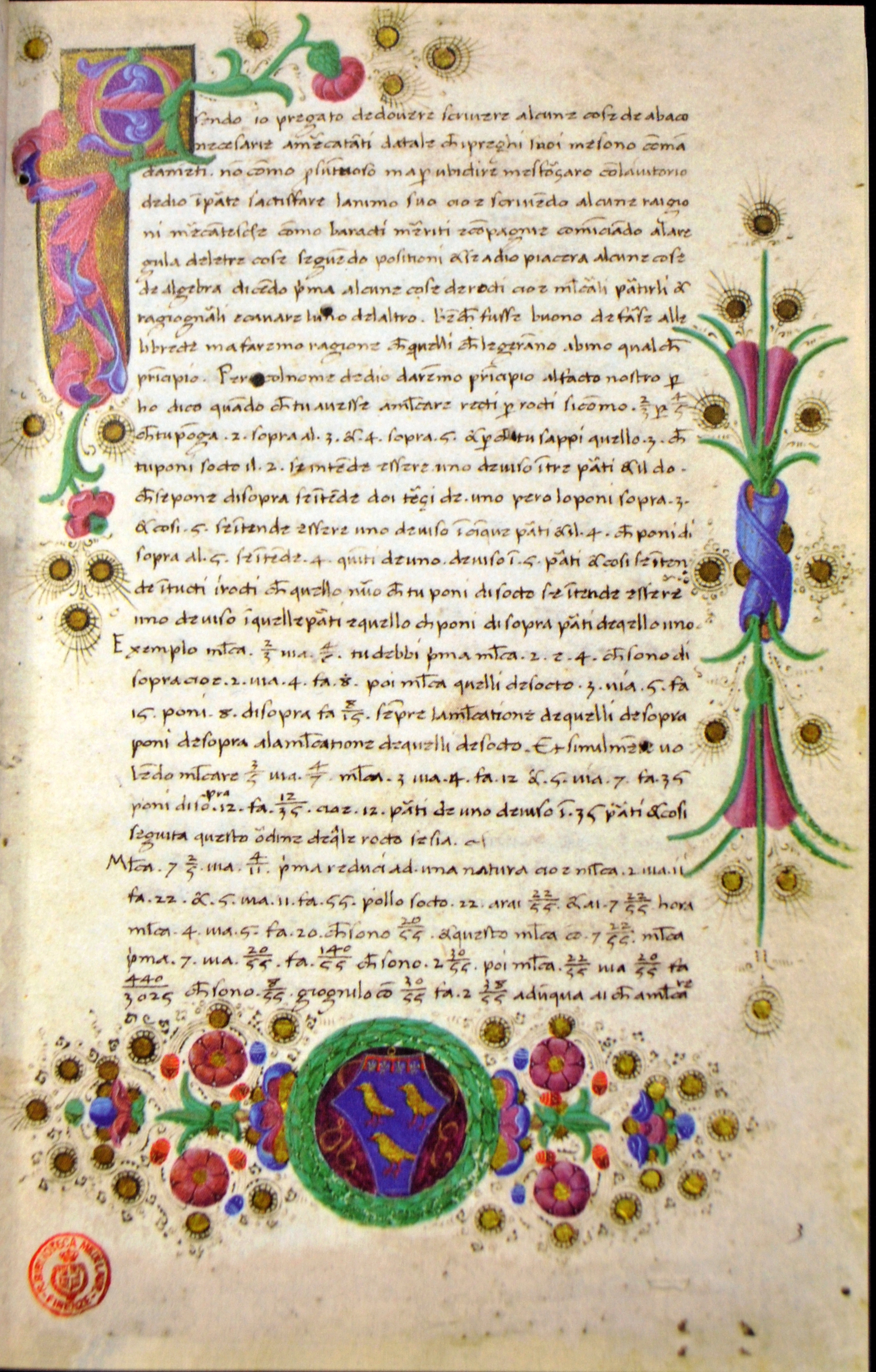 Piero della Francesca - Trattato d'abaco (1) - recueil d'exercices d'arithmétique, d'algèbre et de géométrie du XVe siècle.